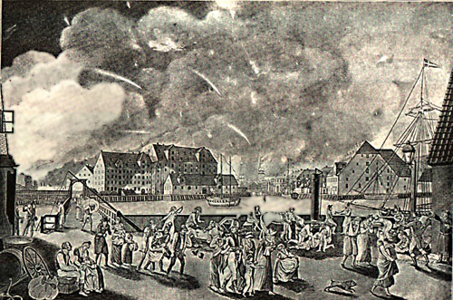 København set fra Christianshavn, natten mellem 4 og 5 september 1807. Langebro, der dengang var en gangbro, ses på maleriet The original is coloured! See for example